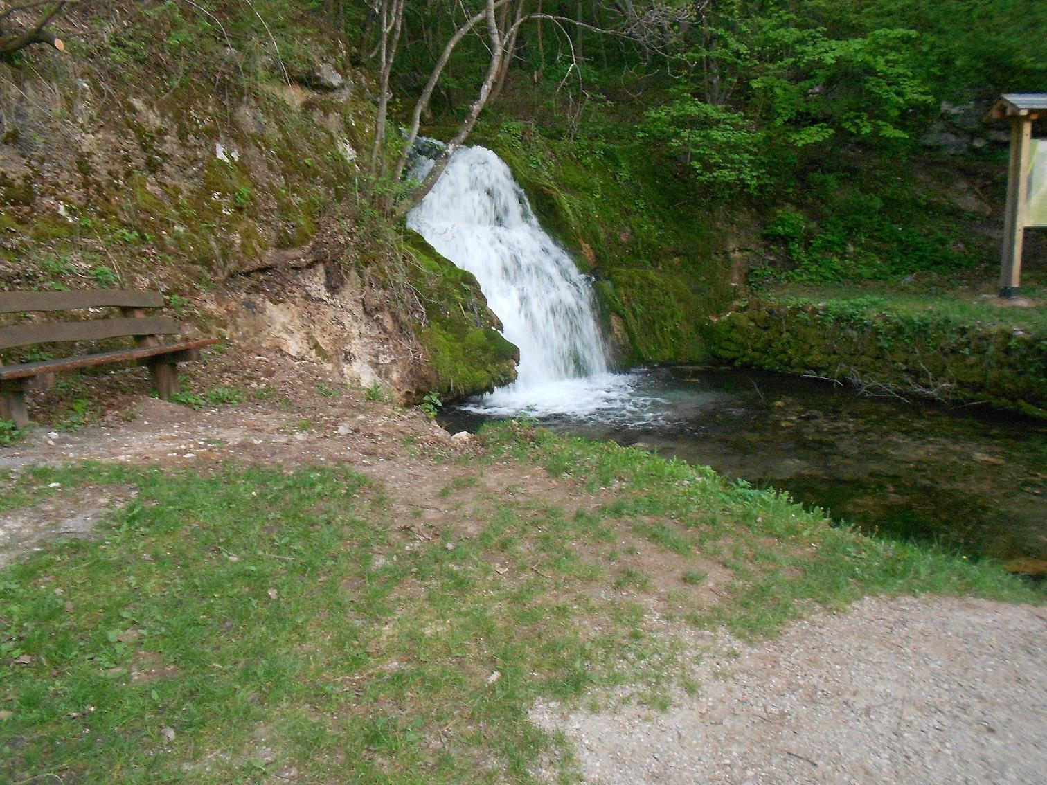 Драган Цветковић сопствена слика Соко бања Градашница један од извора Licensing